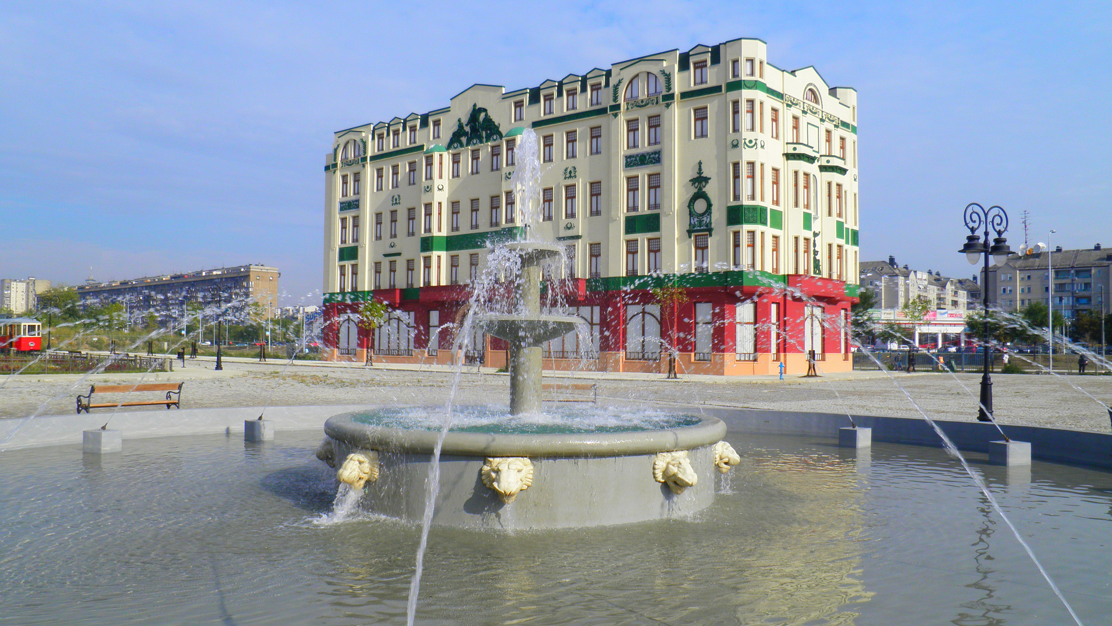 Beogradizacija Beograda